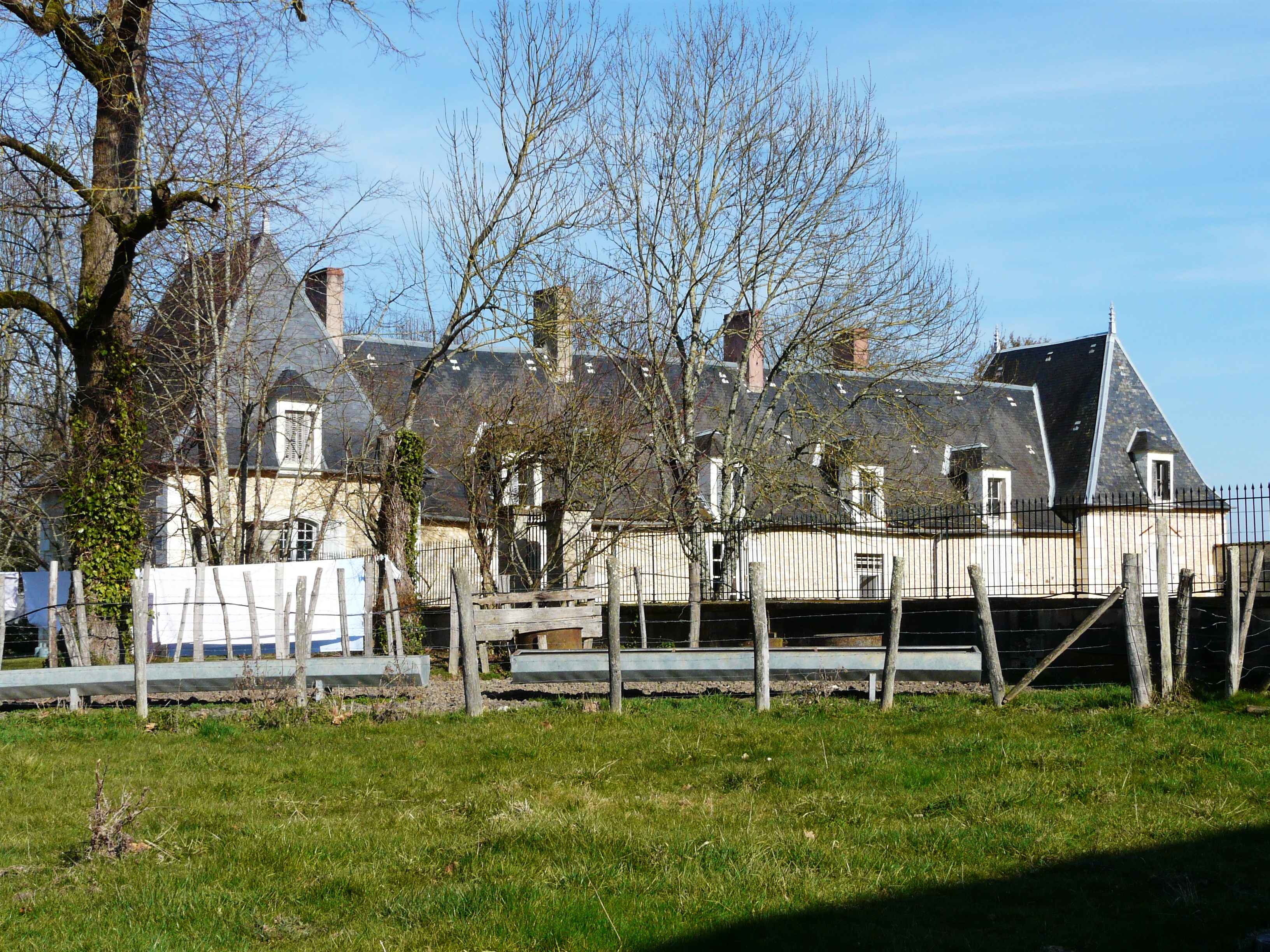 Le manoir du Puy, Eyliac, Dordogne, France.